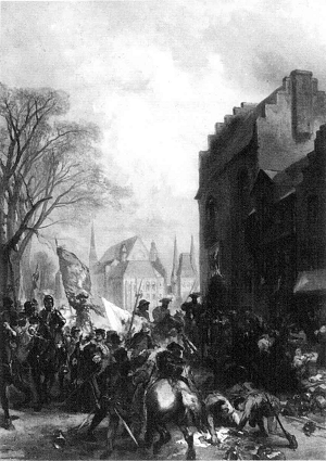 Maarten van Rossum en zijn Gelderse en Utrechtse soldaten brandschatten Den Haag in mei 1528. Doek, olieverf; gemonogrammeerd, 1853; 71×50,5; inv. A 777